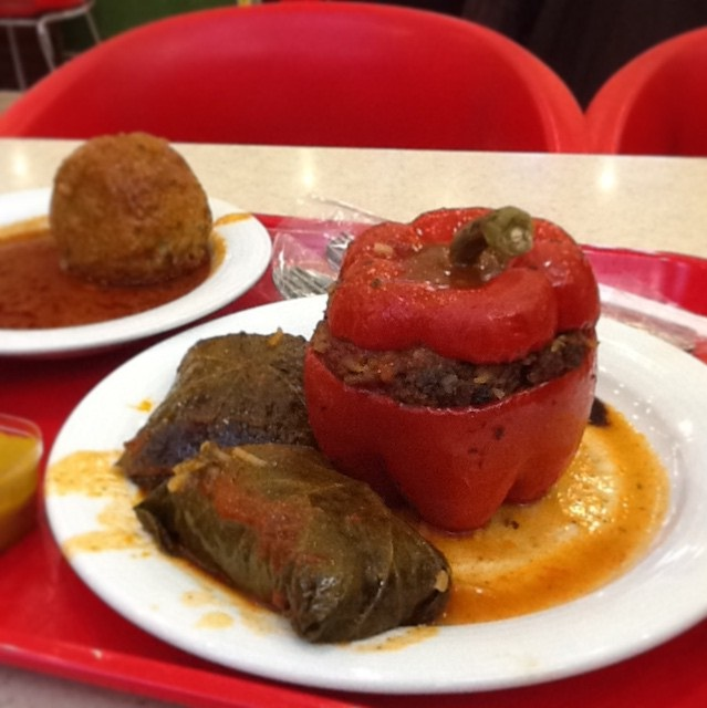 دو دلمه برگ مو در کنار یک دلمه فلفل. در پس‌زمینه،یک کوفته تبریزی نیز دیده می‌شود.